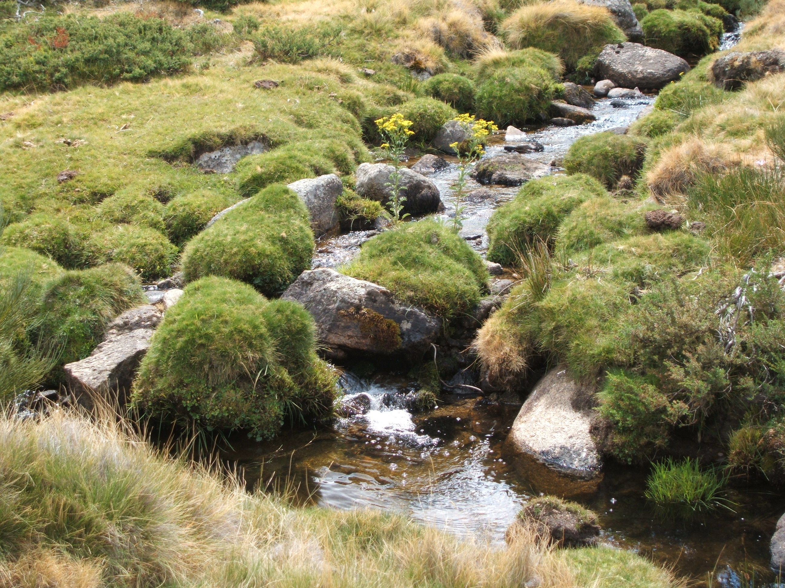 Vegetación de alta montaña. Nacimiento del río Corneja. Villafranca de la Sierra (Ávila, España). AUTOR: Alfredo (con permiso del autor)